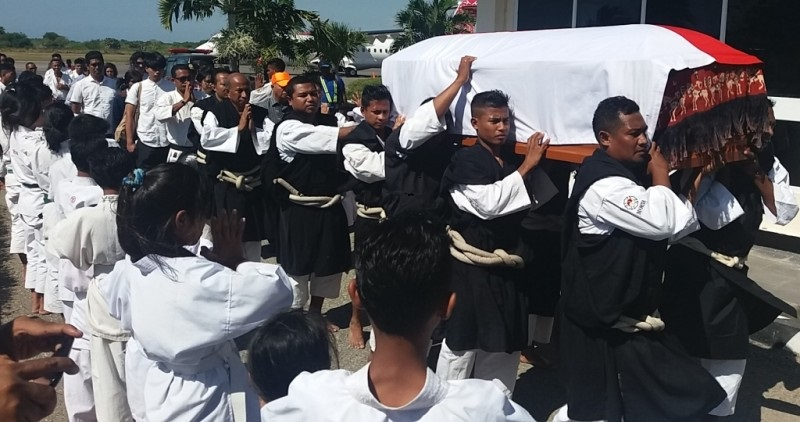 Peti Jenasah Senpai Nabas yang dibungkus Bendera Merah Putih diusung para Kenshi untuk diberi penghormatan terakhir di Gedung KONI NTT